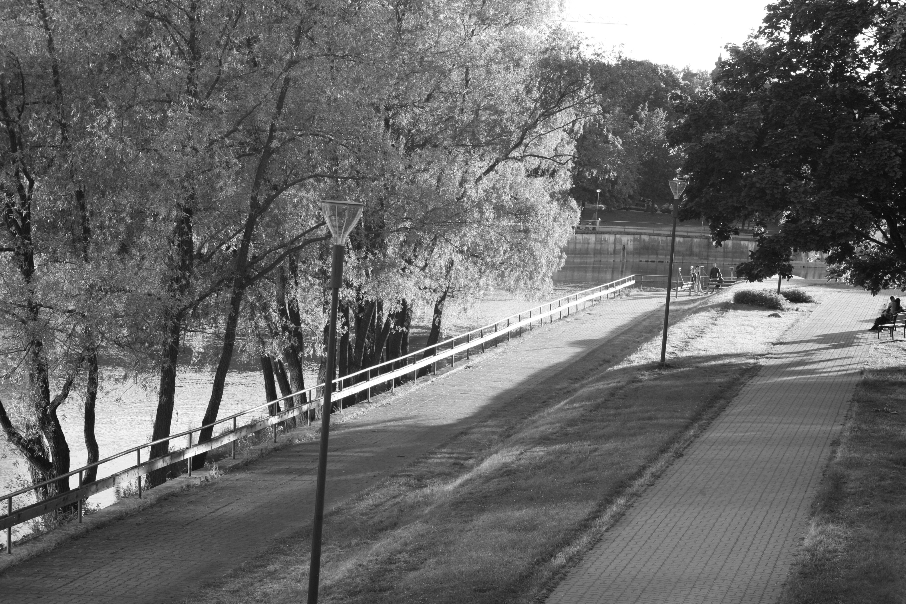 Kaldapromenaad Holmi pargis